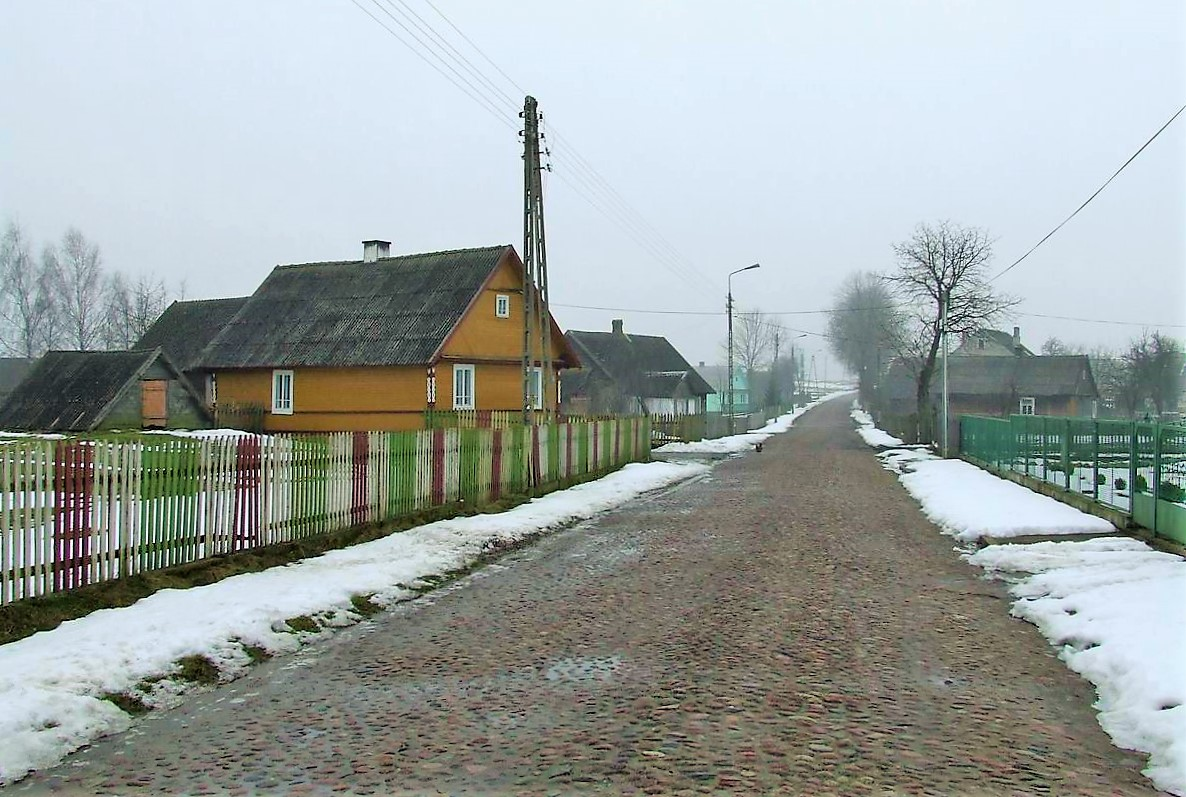 Bohoniki na przedwiośniu